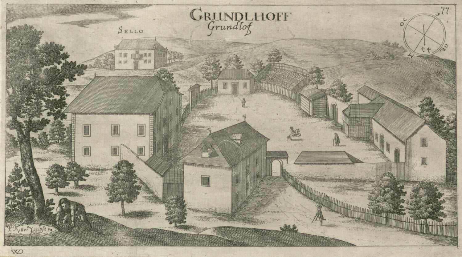 Graščina Grundelj (Grundthoff)